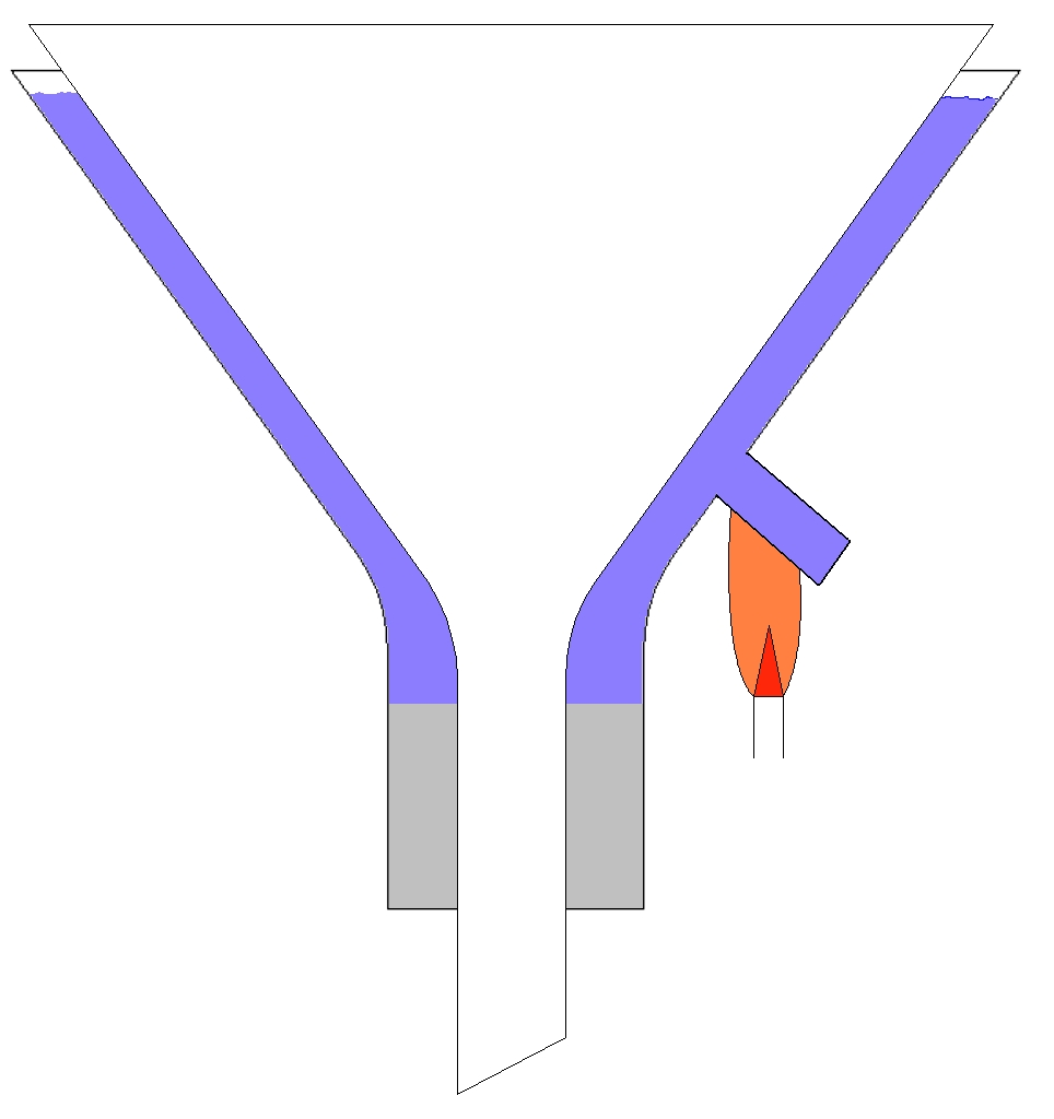 selbst gezeichnet mit c-design paint und gimp von Talos 22:34, 29. Jun 2005 (CEST)